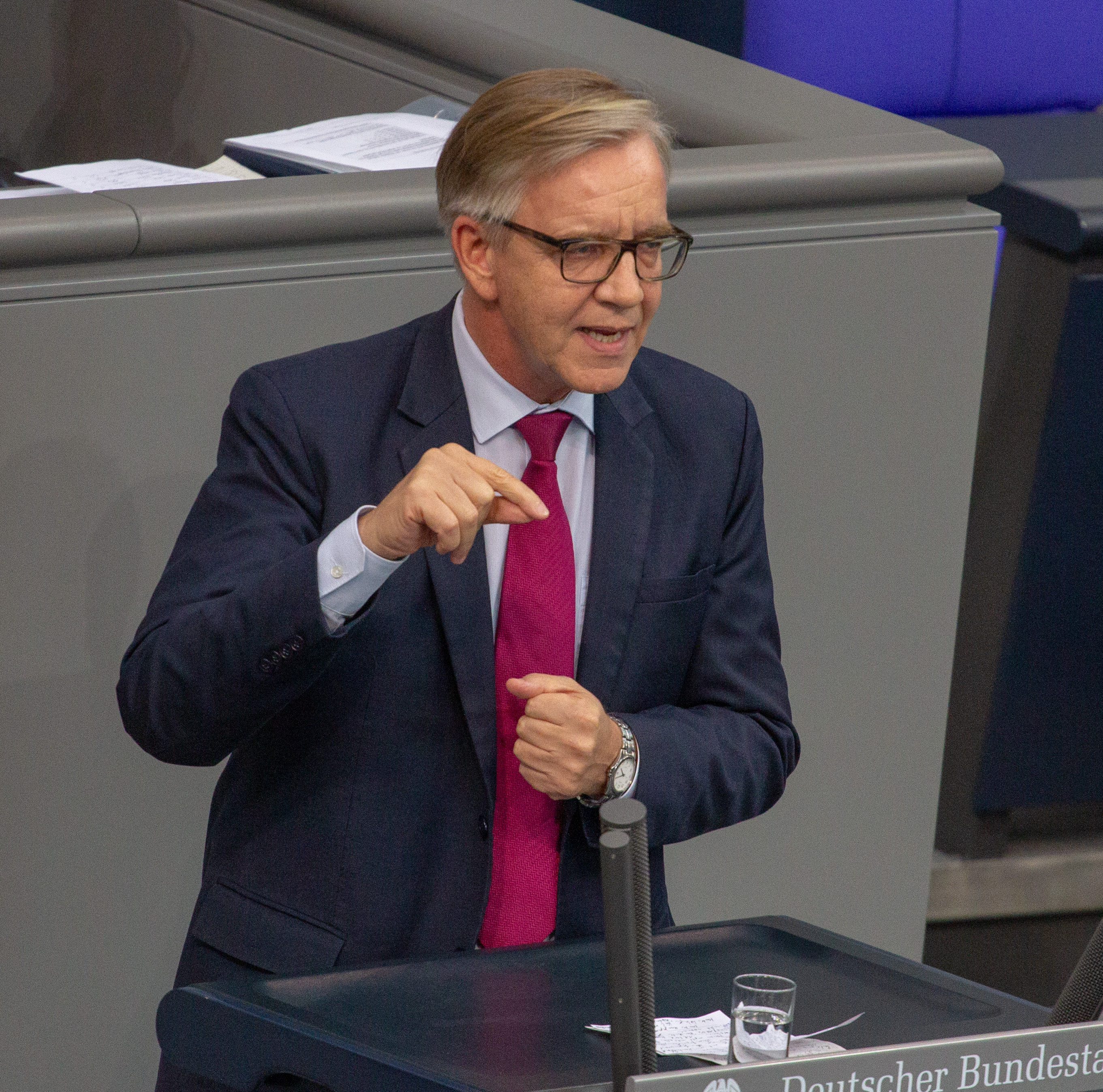 Dietmar Bartsch, Mitglied des Deutschen Bundestages, während einer Plenarsitzung am 10. April 2019 in Berlin.